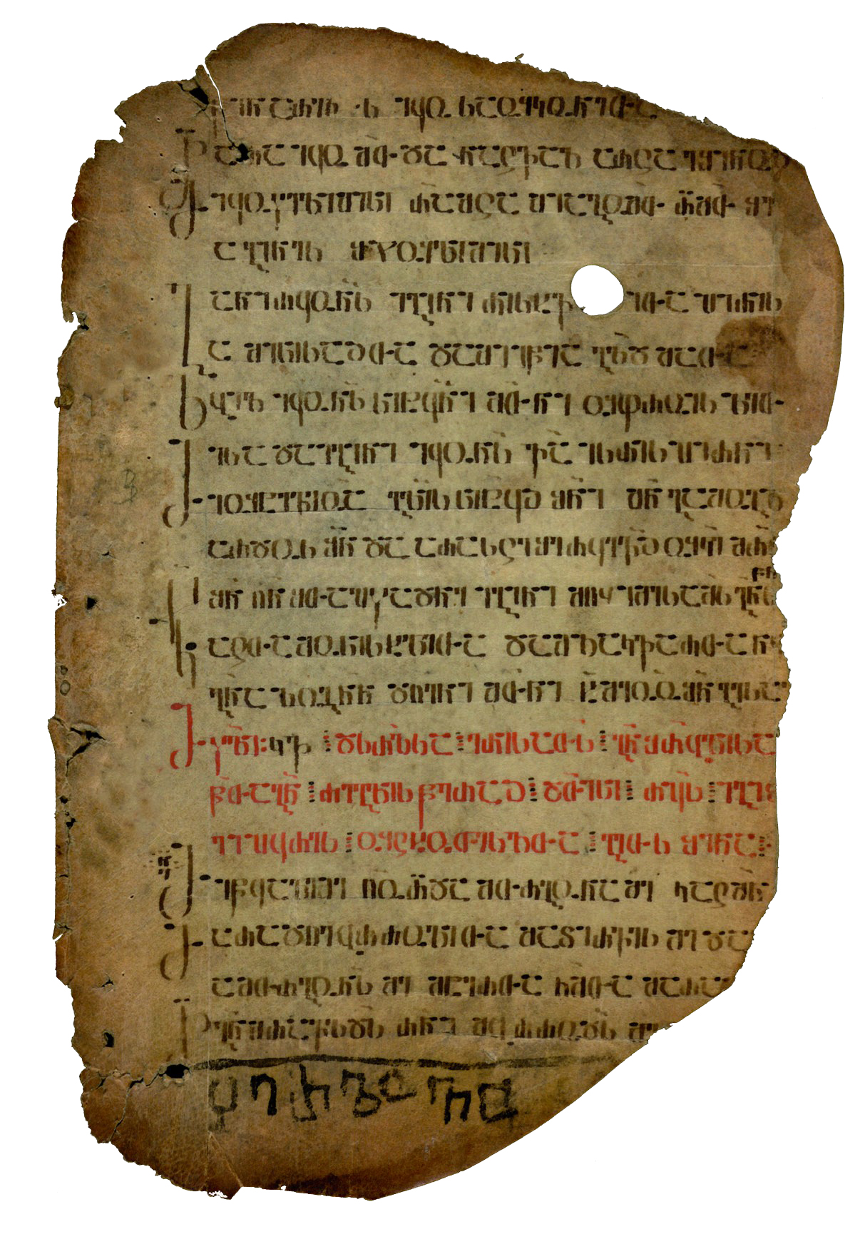 Georgian Psalter, 10th c. 1446/171